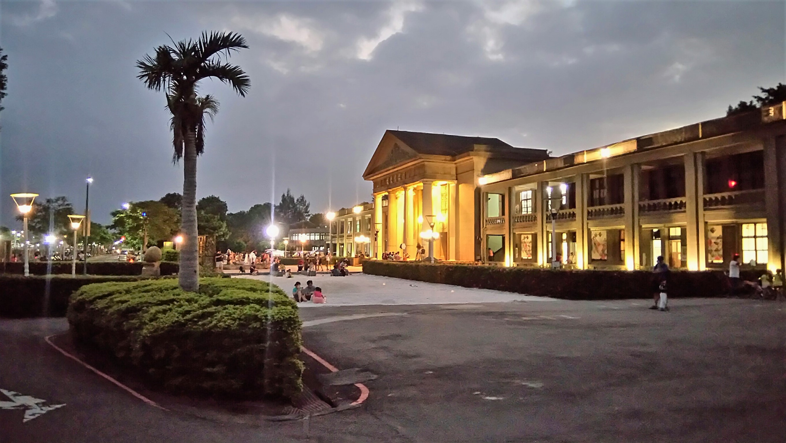 中文（台灣）: 板橋435藝文特區